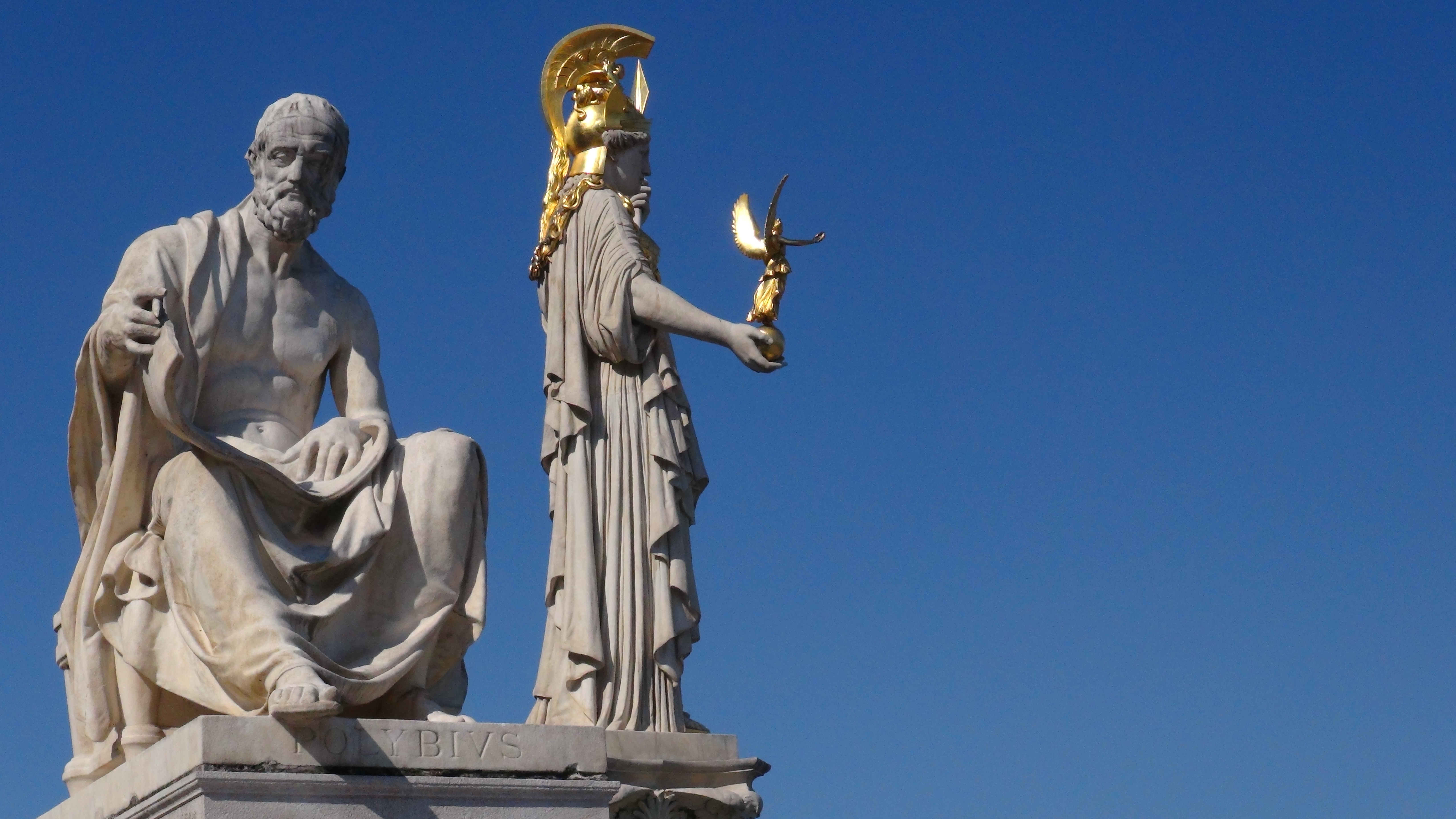 Pallas Athene und Rampe